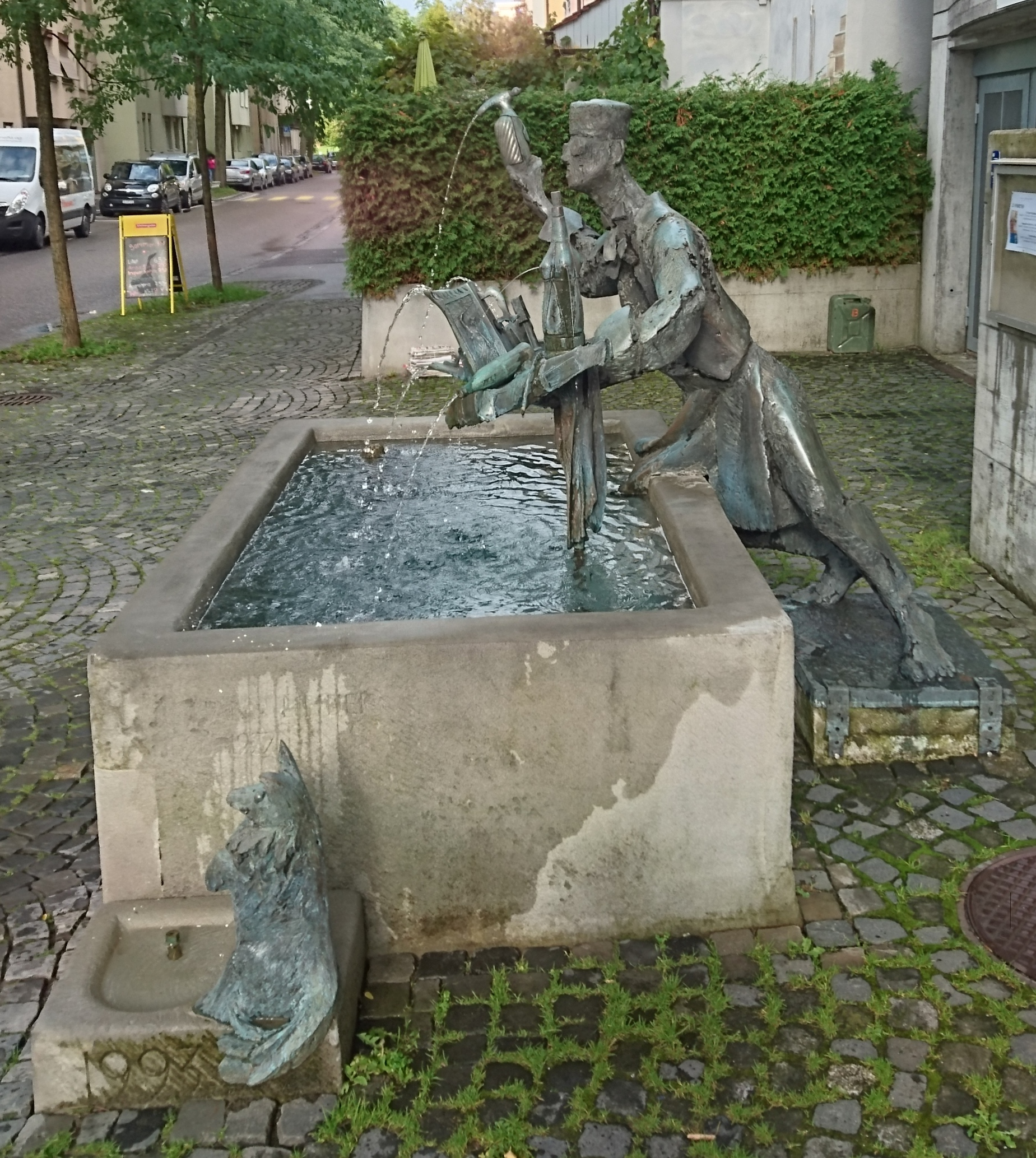 Der Johann-Linder-Brunnen, aus dem jeweils an der Fasnacht an einem Morgen Glühwein ausgeschenkt wird